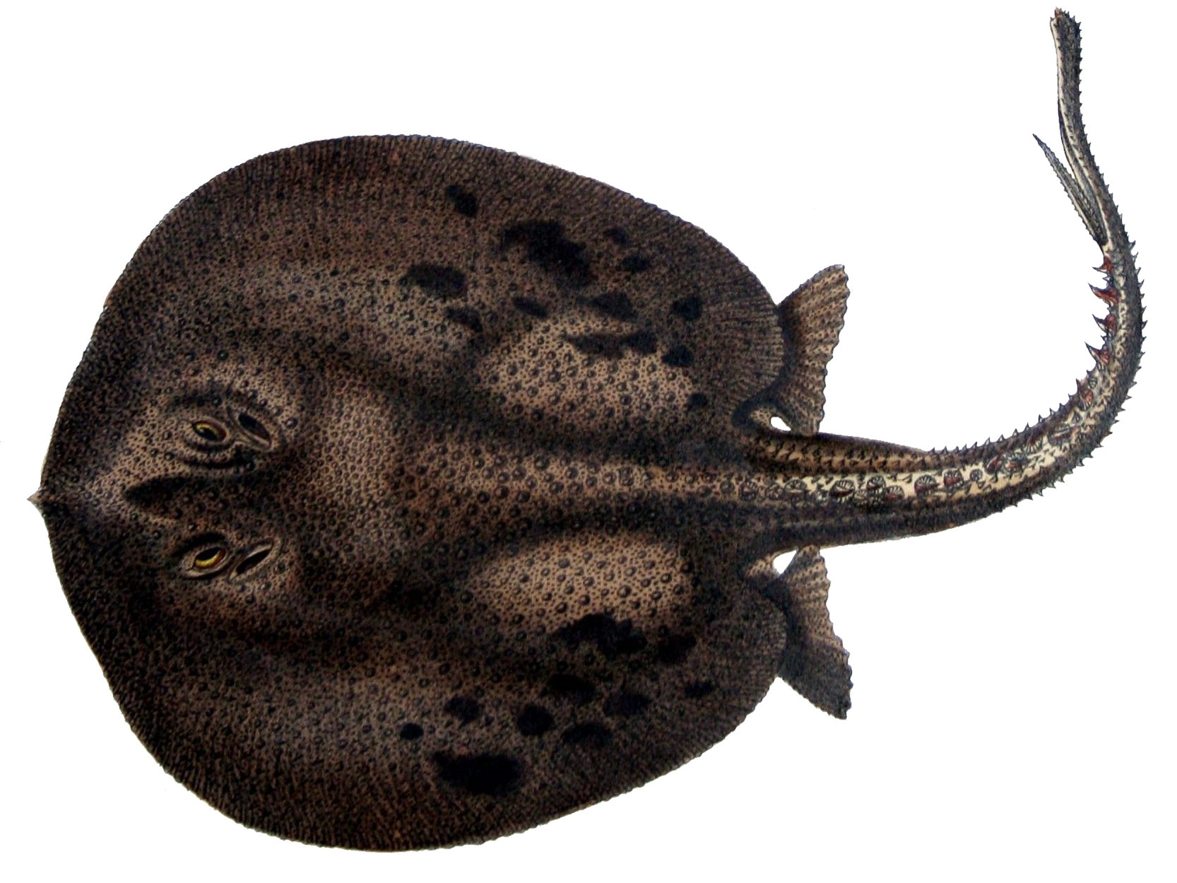 Tœnura orbignyi = Potamotrygon orbignyi